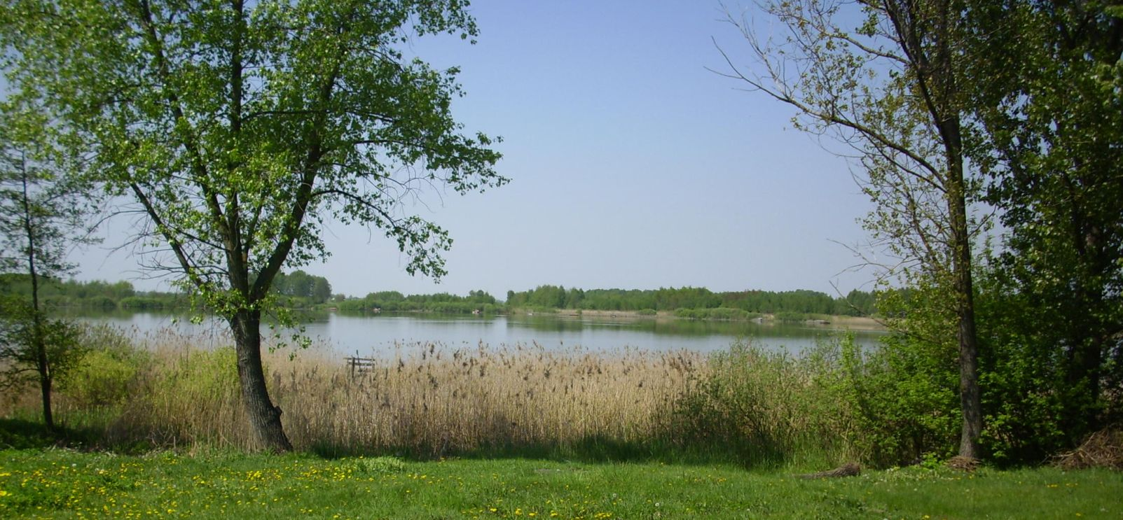 Jezioro Uścimowiec koło Starego Uścimowa.